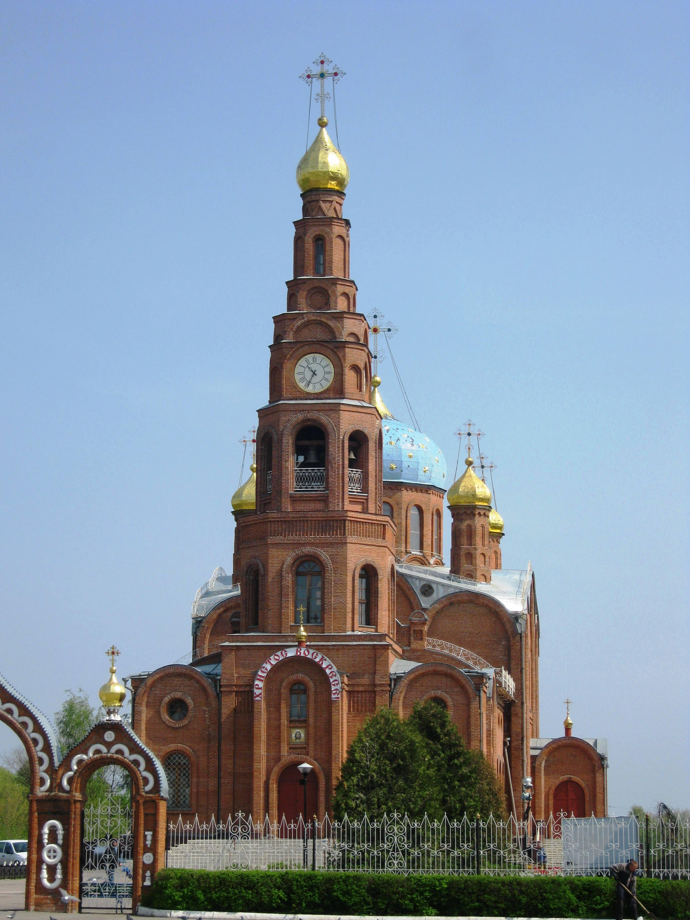 Собор Святого князя Владимира в Новочебоксарске